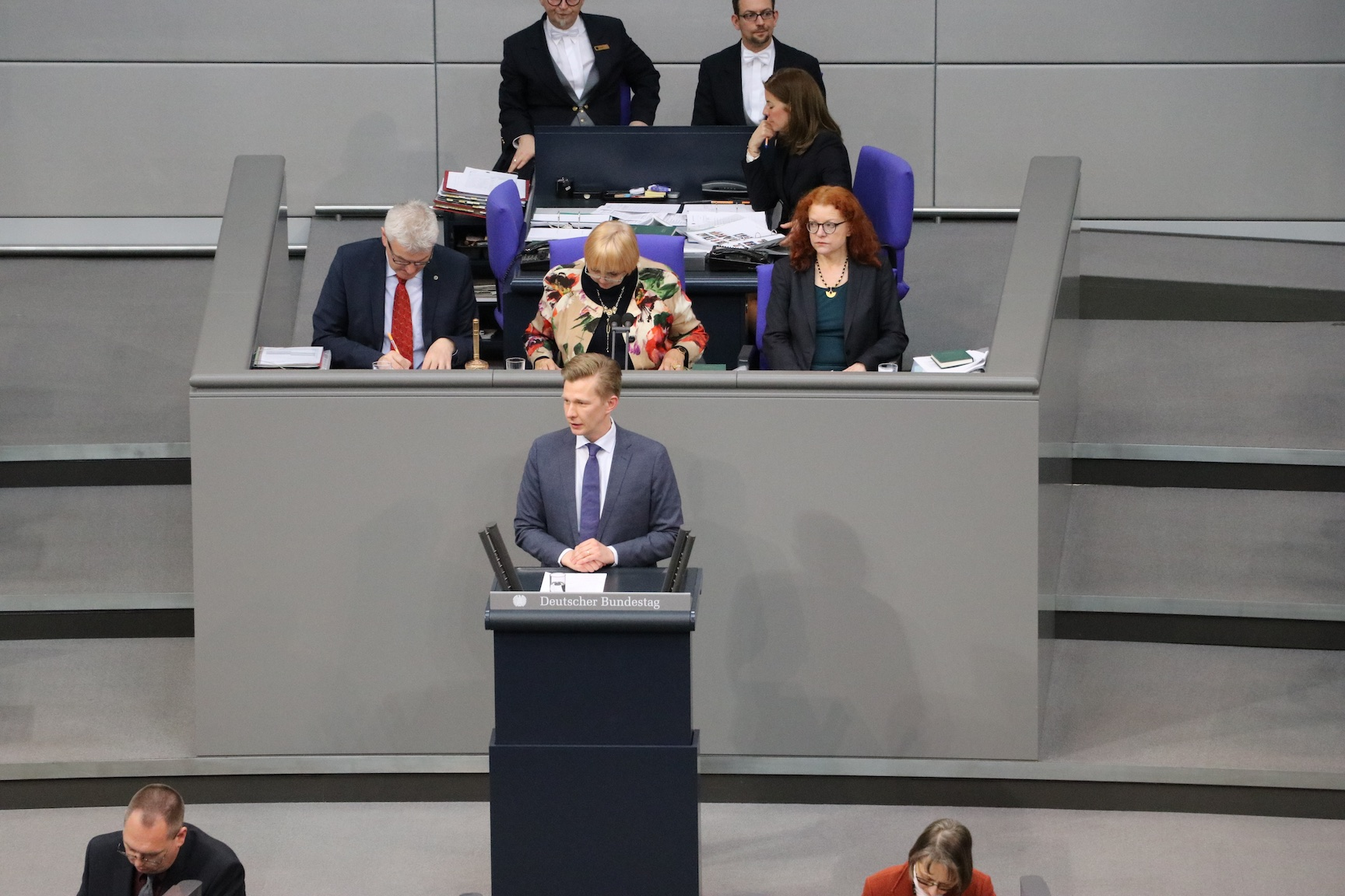 Matthias Seestern-Pauly bei einer Rede im Plenum des Deutschen Bundestages im März 2019